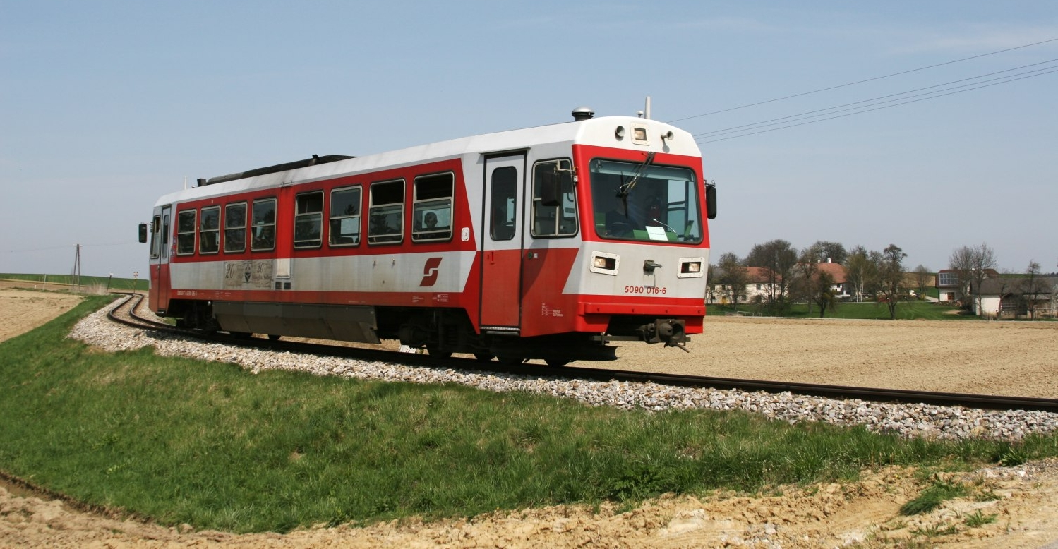 en: Narrow gauge DMU of the ÖBB near Kilb on the Ober Grafendorf - Mank branchline of the Mariazellerbahn de: Schmalspur-Dieseltriebwagen 5090 016-6 der ÖBB bei Kilb an der Lokalbahn Ober-Grafendorf - Mank, der Zweigstrecke der Mariazellerbahn.